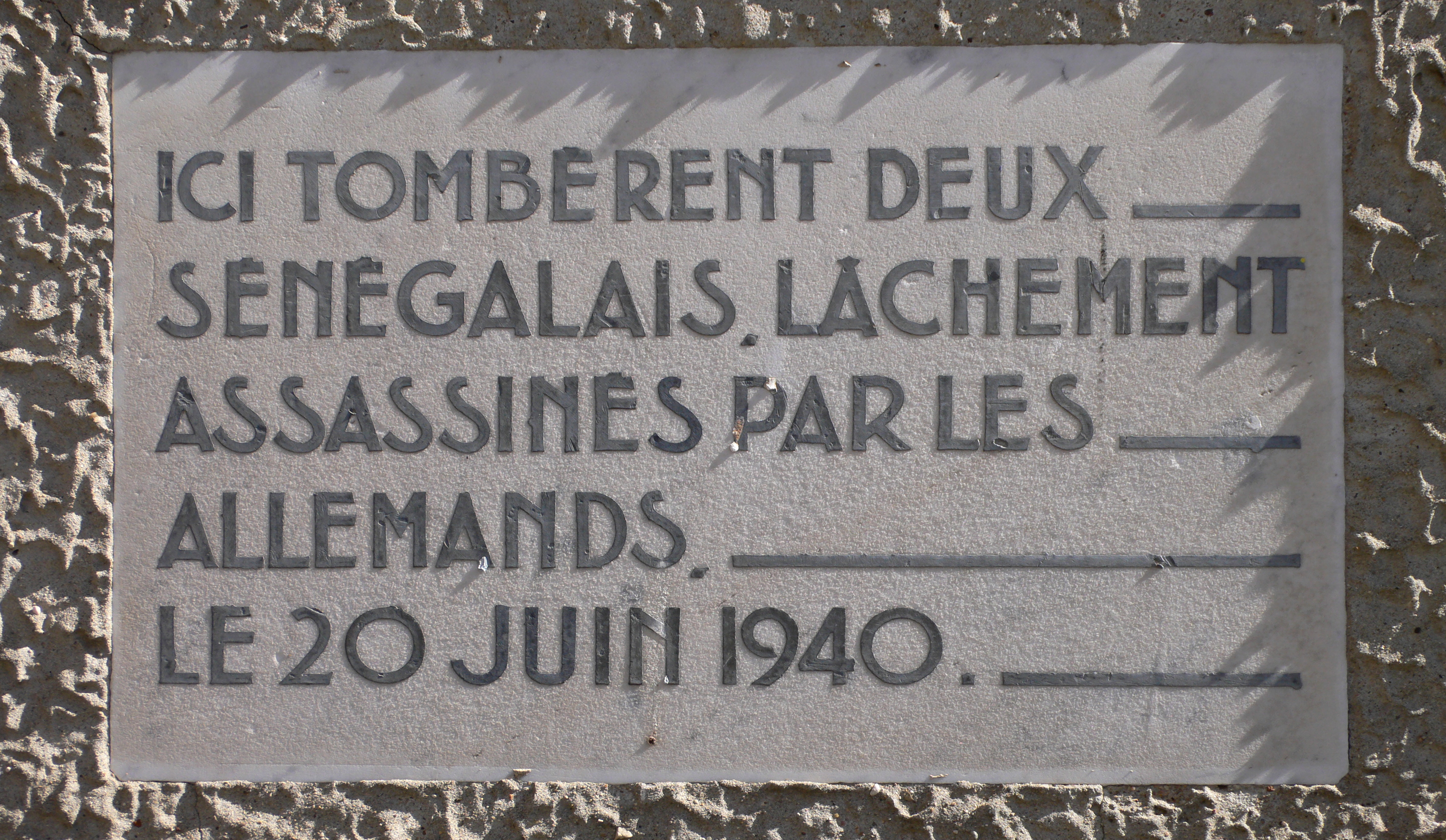 Champagne-au-Mont-d'Or - Plaque commémorant l'assassinat de deux tirailleurs sénégalais.